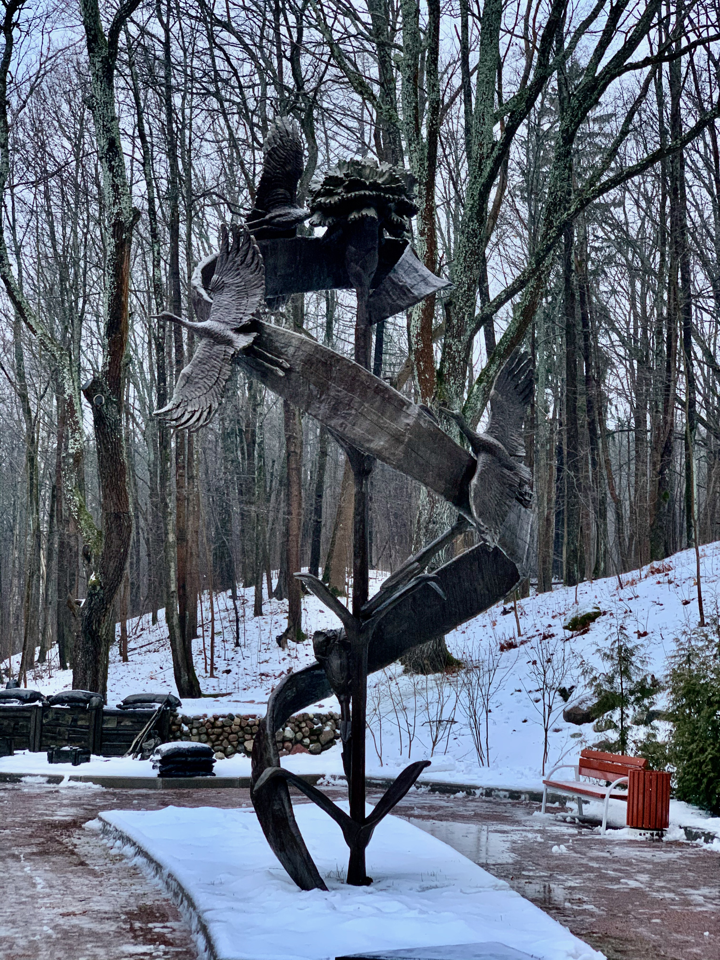 Монумент Ушкову